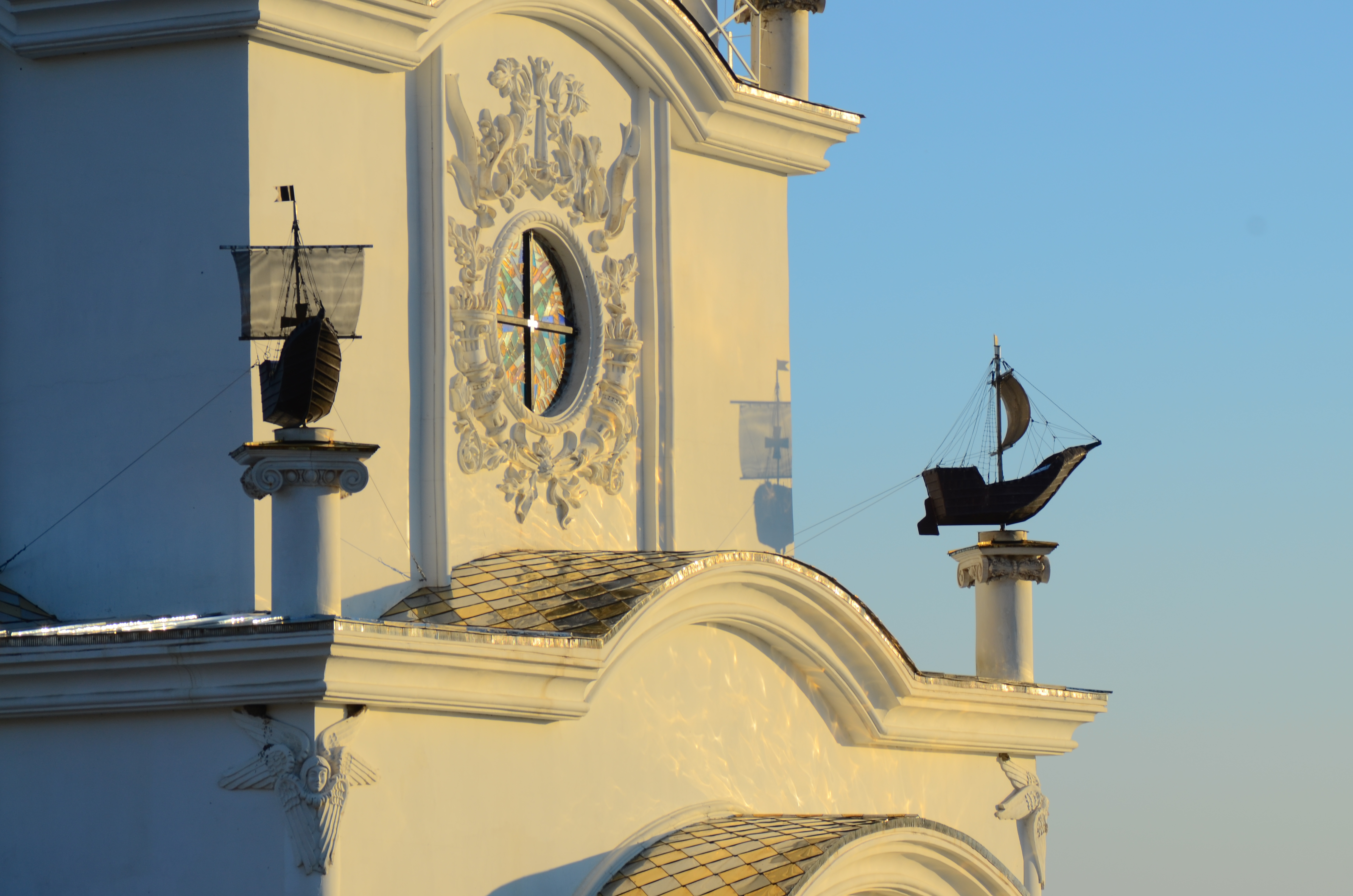 Крым.